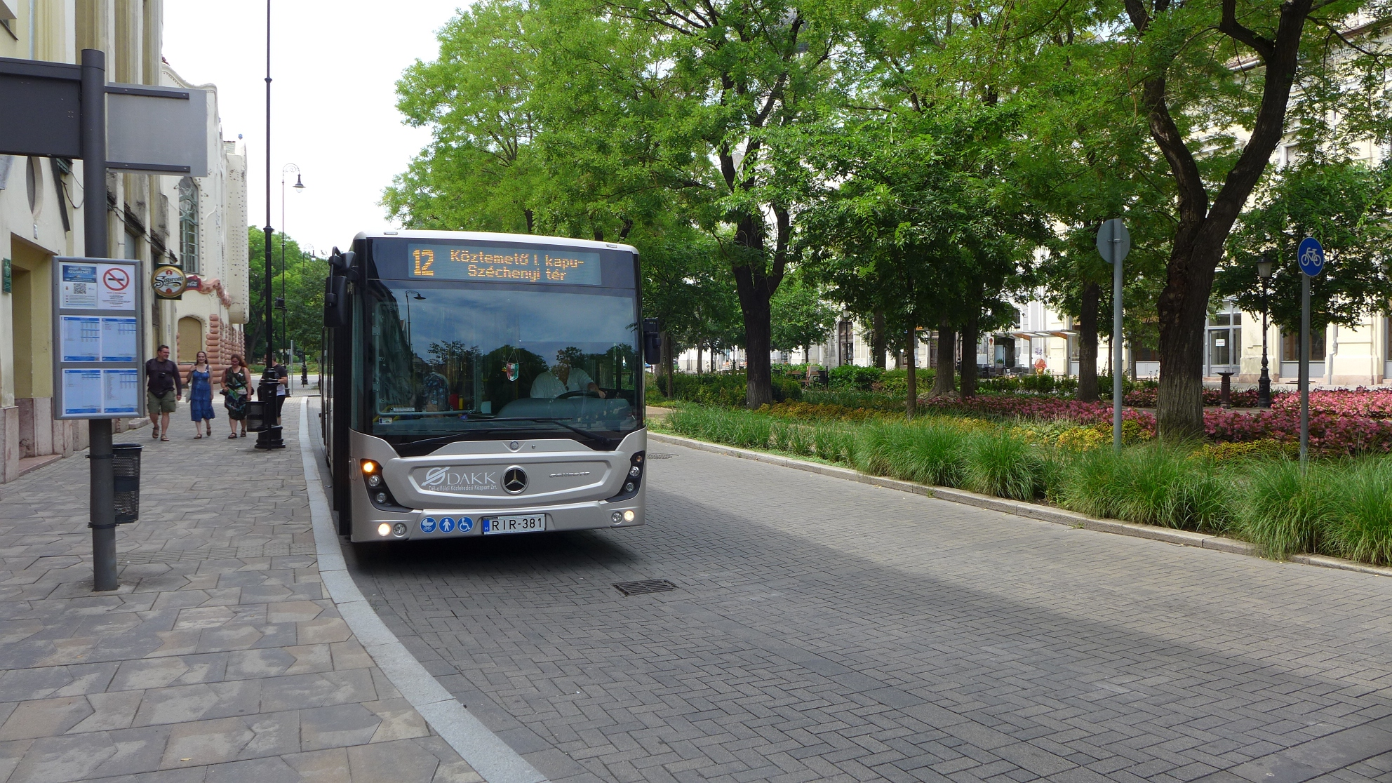 A 2019-es Wikitábor Kecskeméten. Rákóczi út